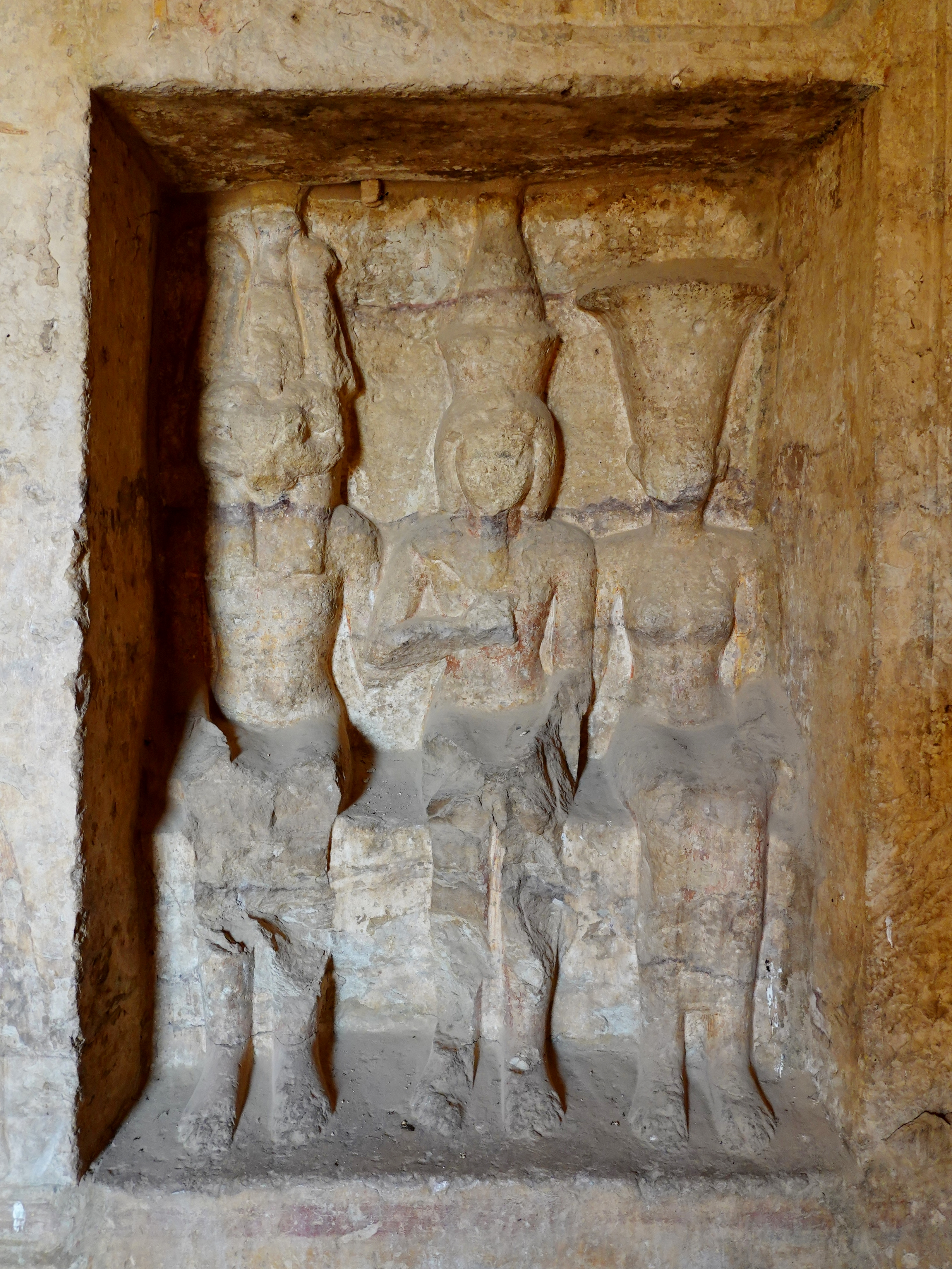 Innenraum des den Göttern Amun-Re, Re-Harachte, Chnum und Anukis geweihten Tempels Ramses’ II., ursprünglich aus Beit el-Wali, im Freilichtmuseum auf der Insel Neu-Kalabscha im Nassersee, Ägypten